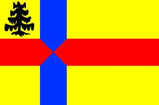 vlag voormalige gemeente Roden